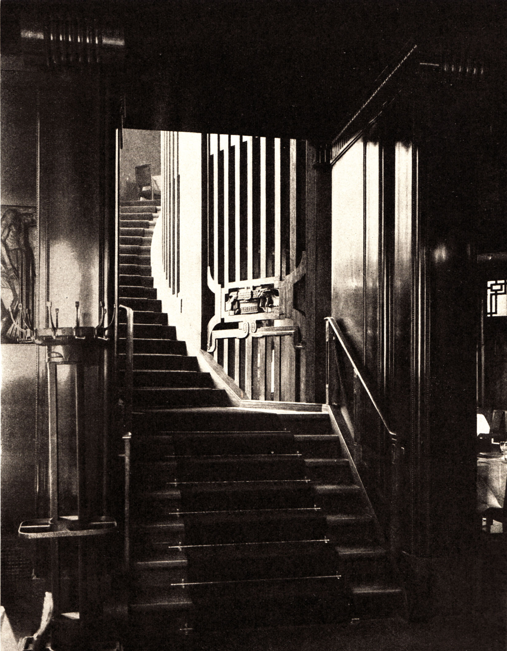 Berlin - Weinhaus Rheingold, Blick vom Mahagonisaal in die Treppe der Rotunde